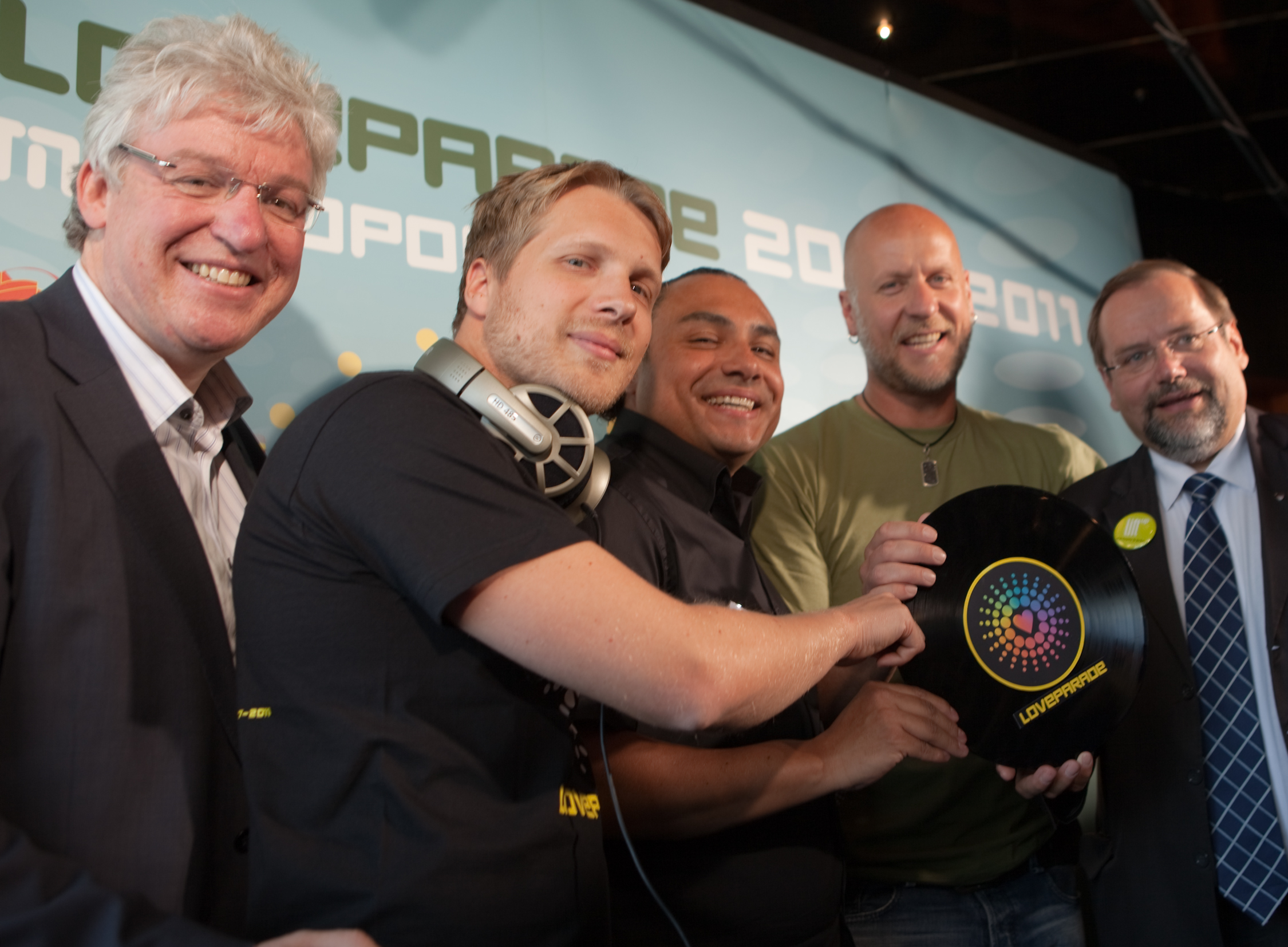 Pressekonferenz im Vorfeld der Loveparade 2010 am 17. Juni 2010 in Duisburg. Abgebildete Personen von links: Oliver Scheytt (vom Projekt RUHR.2010), Oliver Pocher (Entertainer), Anthony Rother (Electro-Musiker), Rainer Schaller (Veranstalter der Loveparade 2010 als Geschäftsführer der Lopavent GmbH sowie Sponsor), Adolf Sauerland (zu dieser Zeit Oberbürgermeister der Stadt Duisburg). Fotograf: Christoph Müller-Girod Homepage